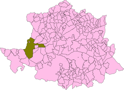 Alcántara